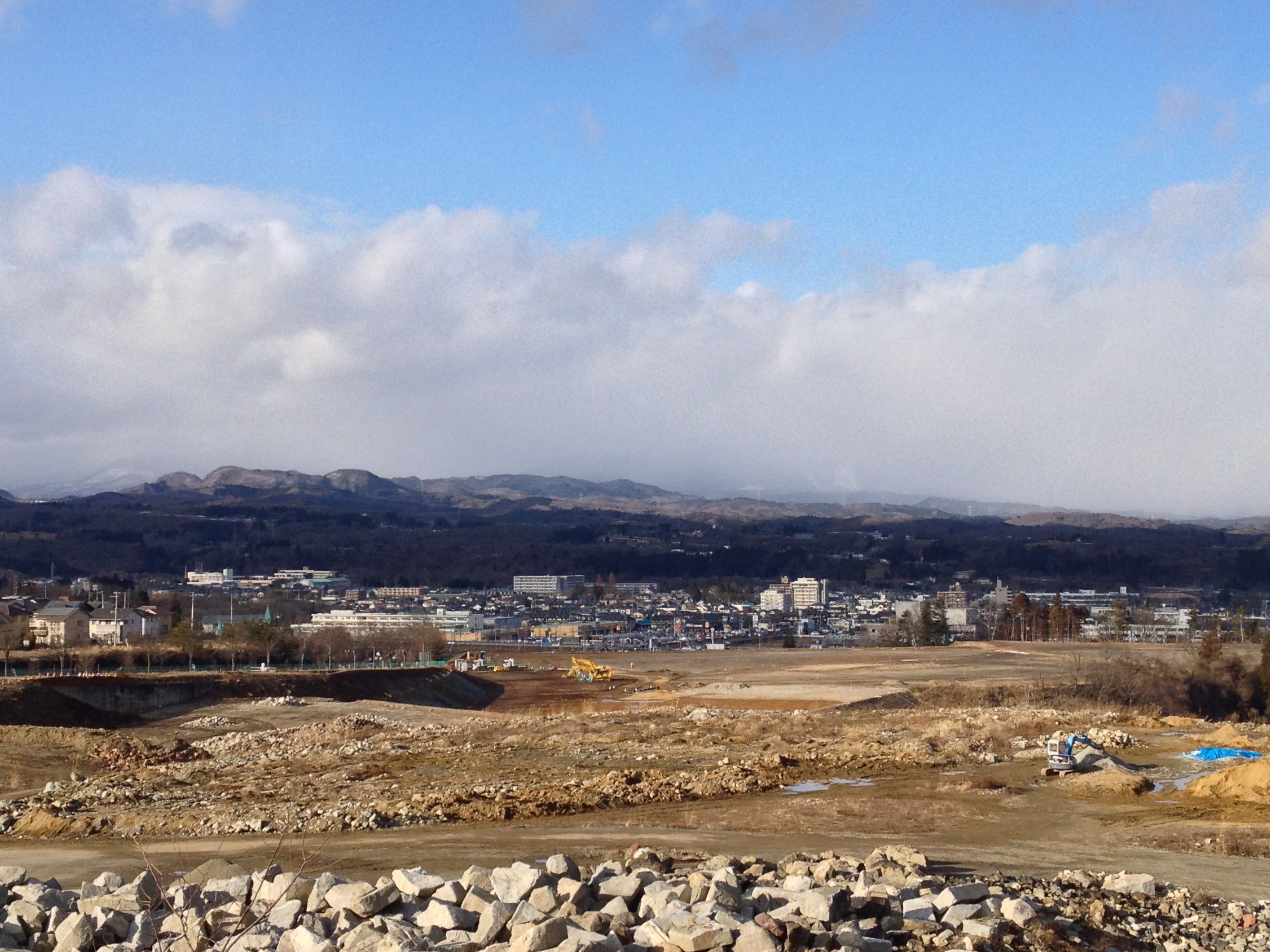 愛子地区遠景（仙台市青葉区）